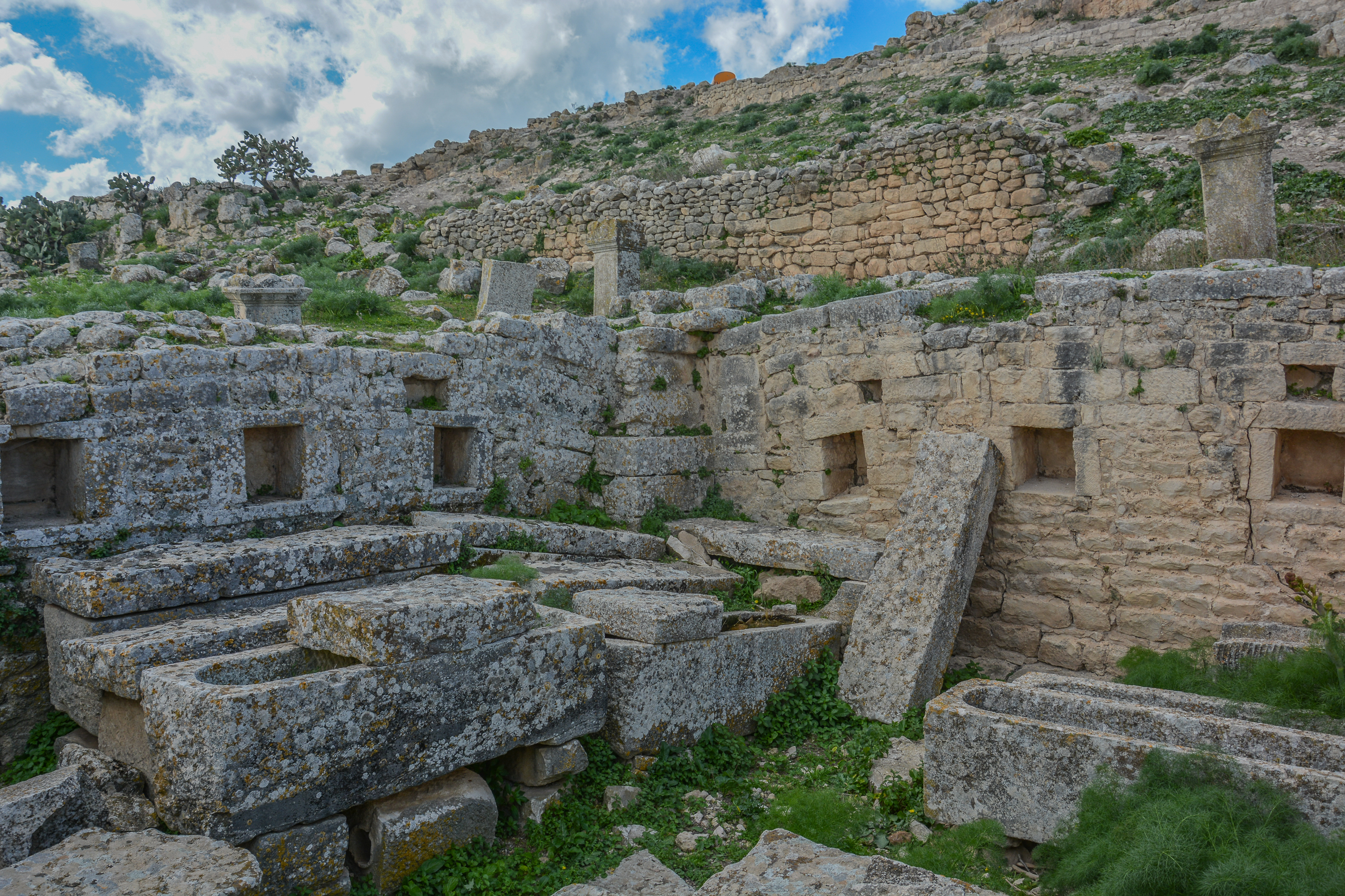 Crypte funéraire située au sud-ouest de la basilique chrétienne